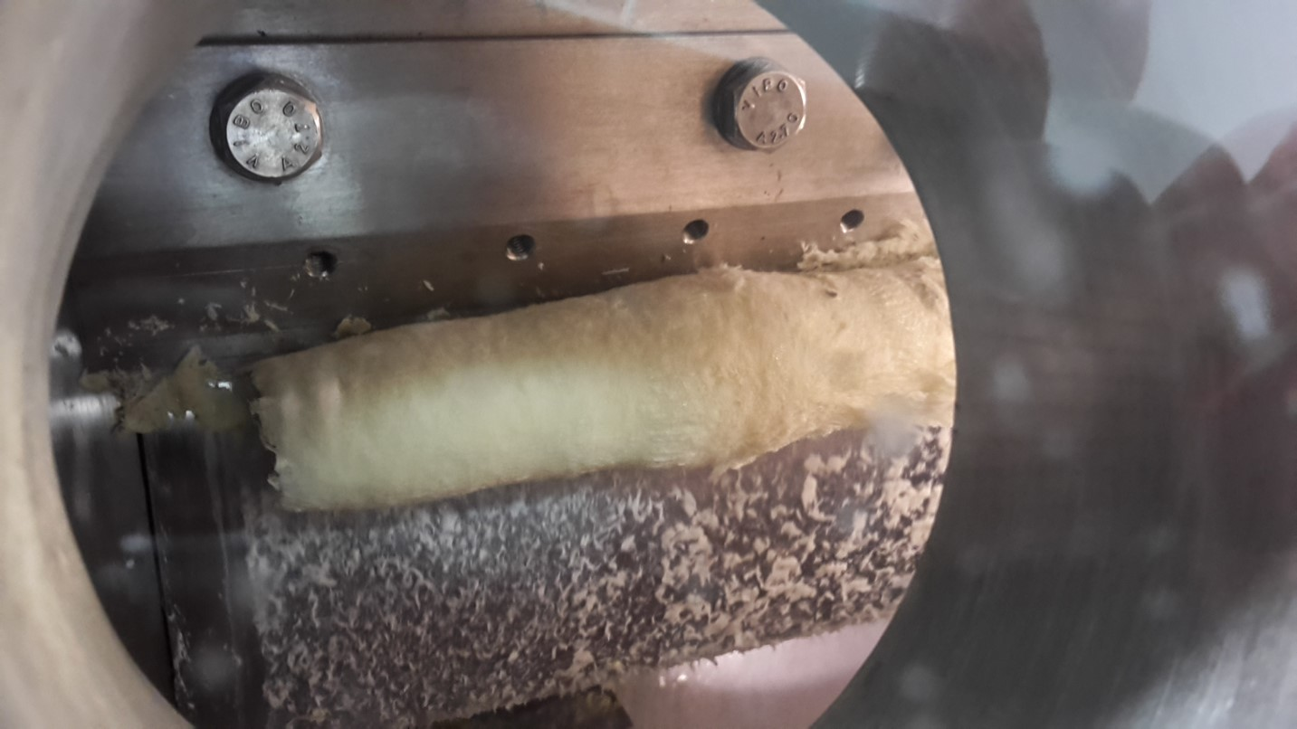 Das Produkt trocknet auf der Walze des Walzentrockners. Der getrocknete Feststoff wird mit Hilfe des Messerbalkens von der Walze "abgenommen". Der Produktfilm hat sich in diesem Fall aufgerollt. Der Form halber spricht man hier von einer "Zigarre".